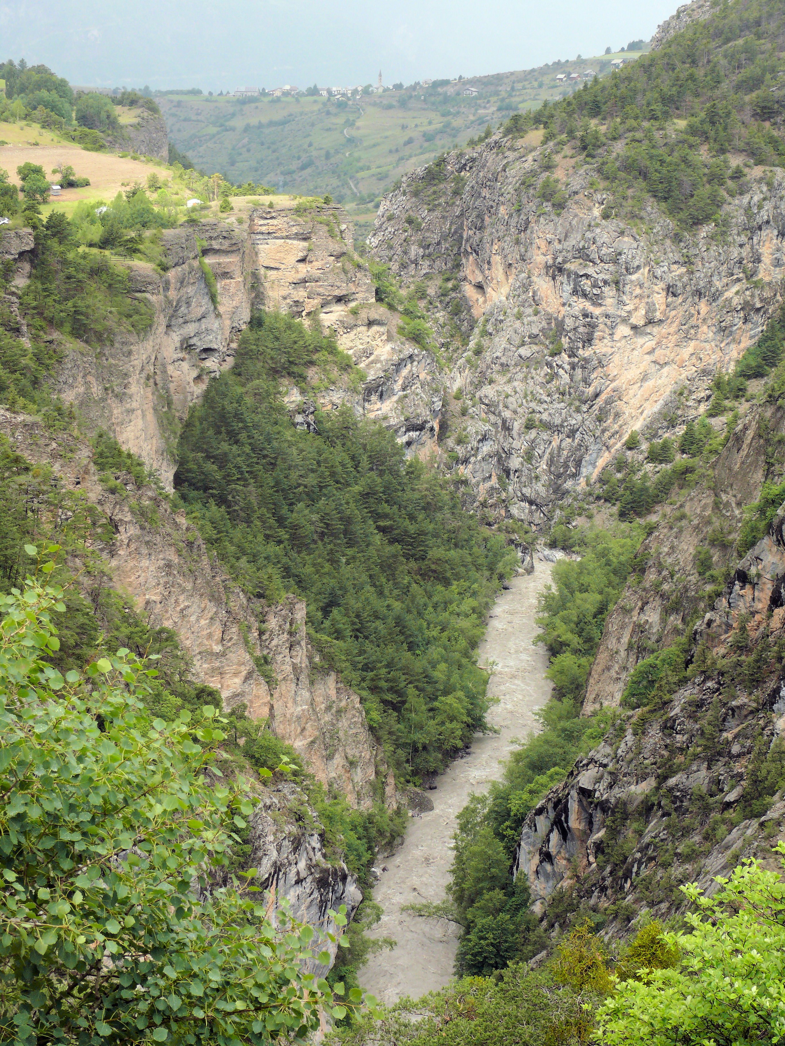 Gorges du Guil (Hautes-Alpes) - Vers Guillestre